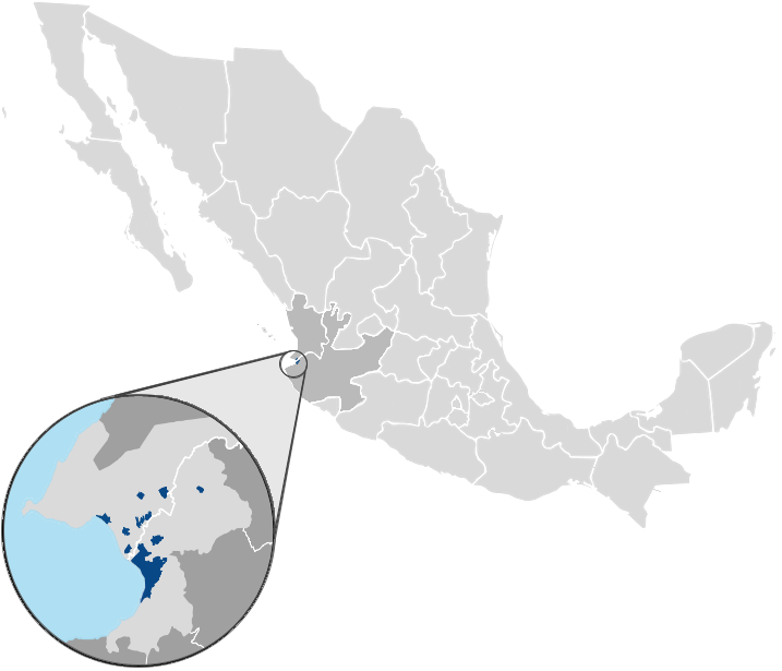 Zona Metropolitana de Puerto Vallarta, con Puerto Vallarta. En el Municipo de Puerto Vallarta del estado de Jalisco, y Municipo de Bahia de Banderas del estado de Nayarit, México.